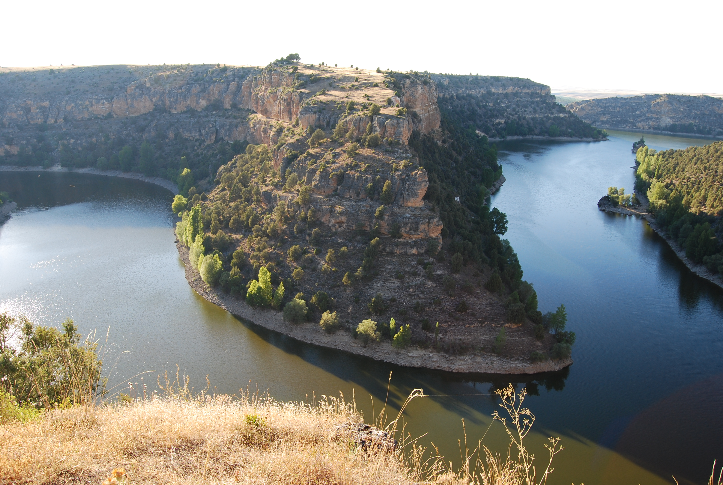 Hoces del río Durantón. España, 2008.